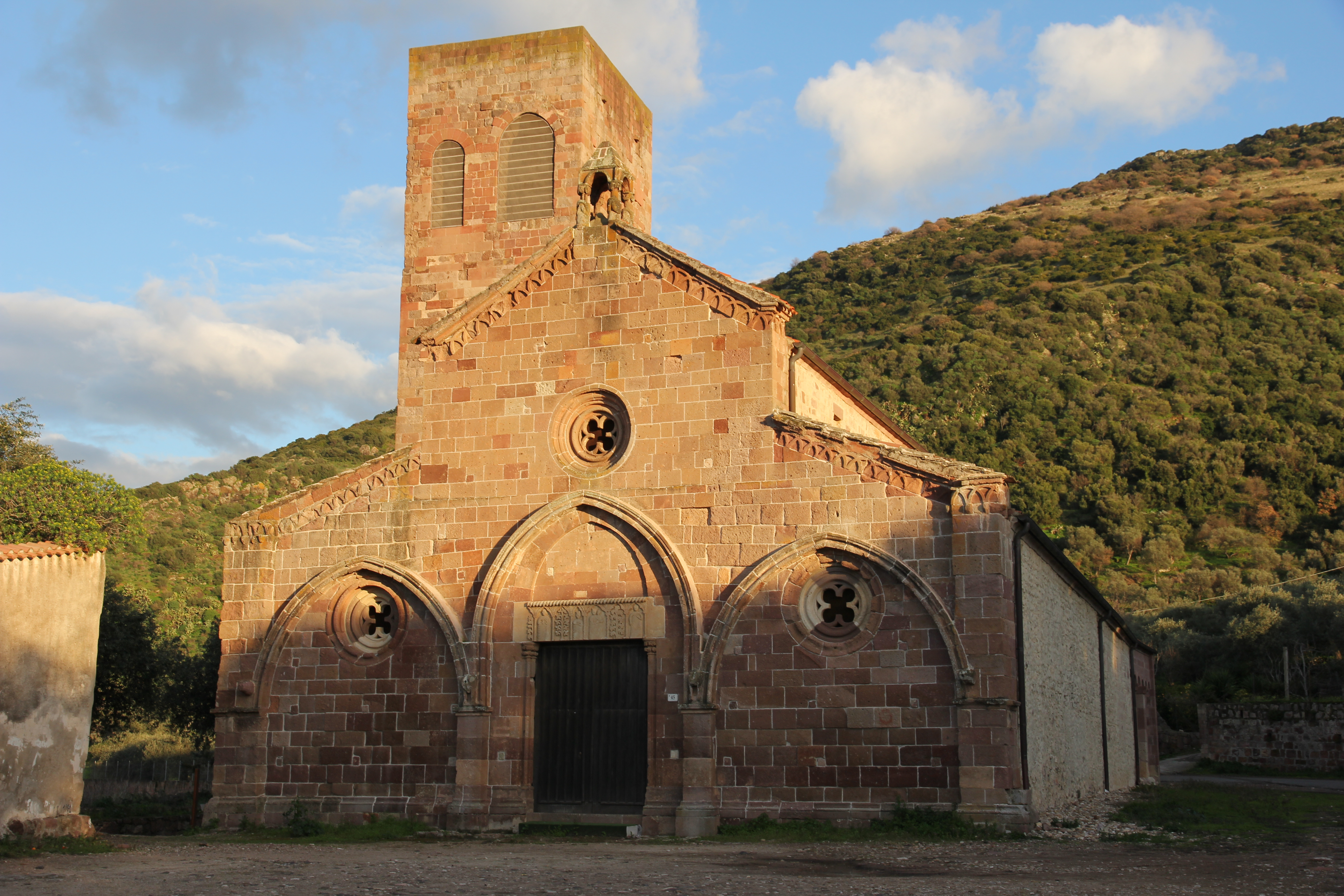 Bosa - Chiesa di San Pietro extra muros m 11 s.l.m.